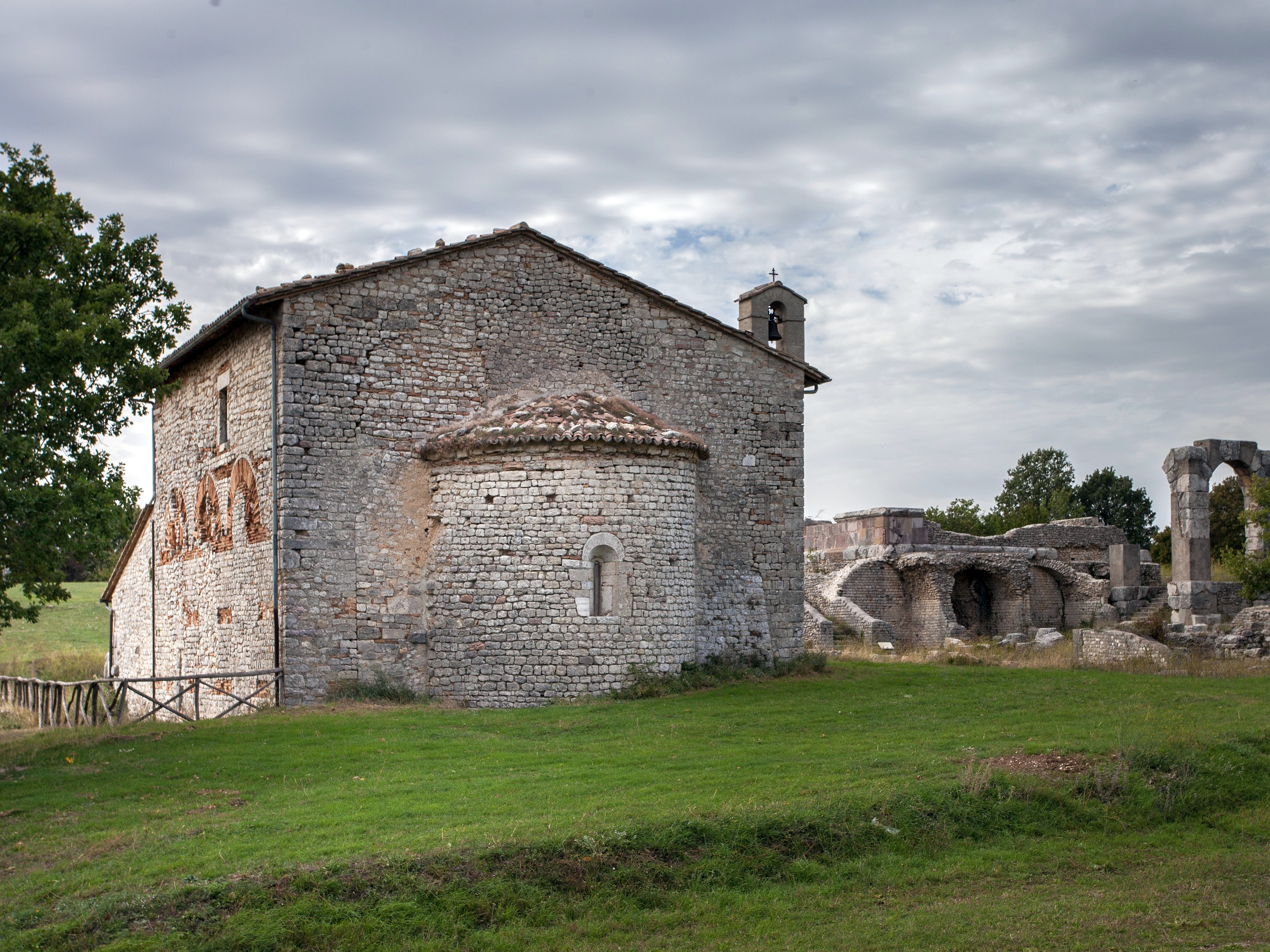 Area Archeologica di Carsulae - MIBAC This is a photo of a monument which is part of cultural heritage of Italy.